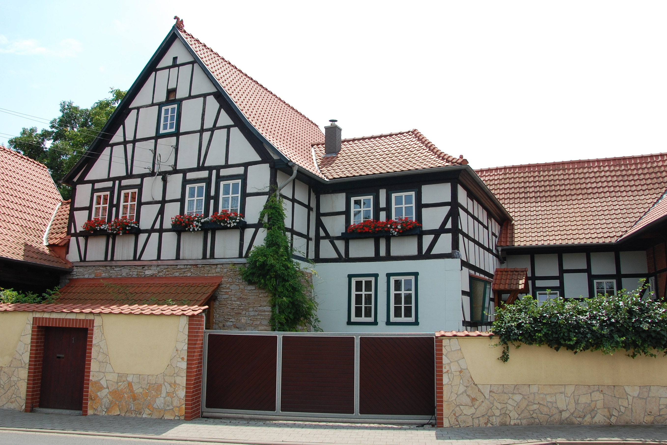 Haus Chausseestraße 1 in Bad Suderode